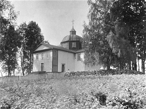 Беларуская (тарашкевіца): Сарокі (Saroki). Царква Сьвятога Яна Багаслова